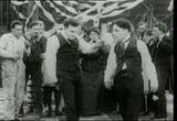 Escena de la película Recreation de Charlie Chaplin